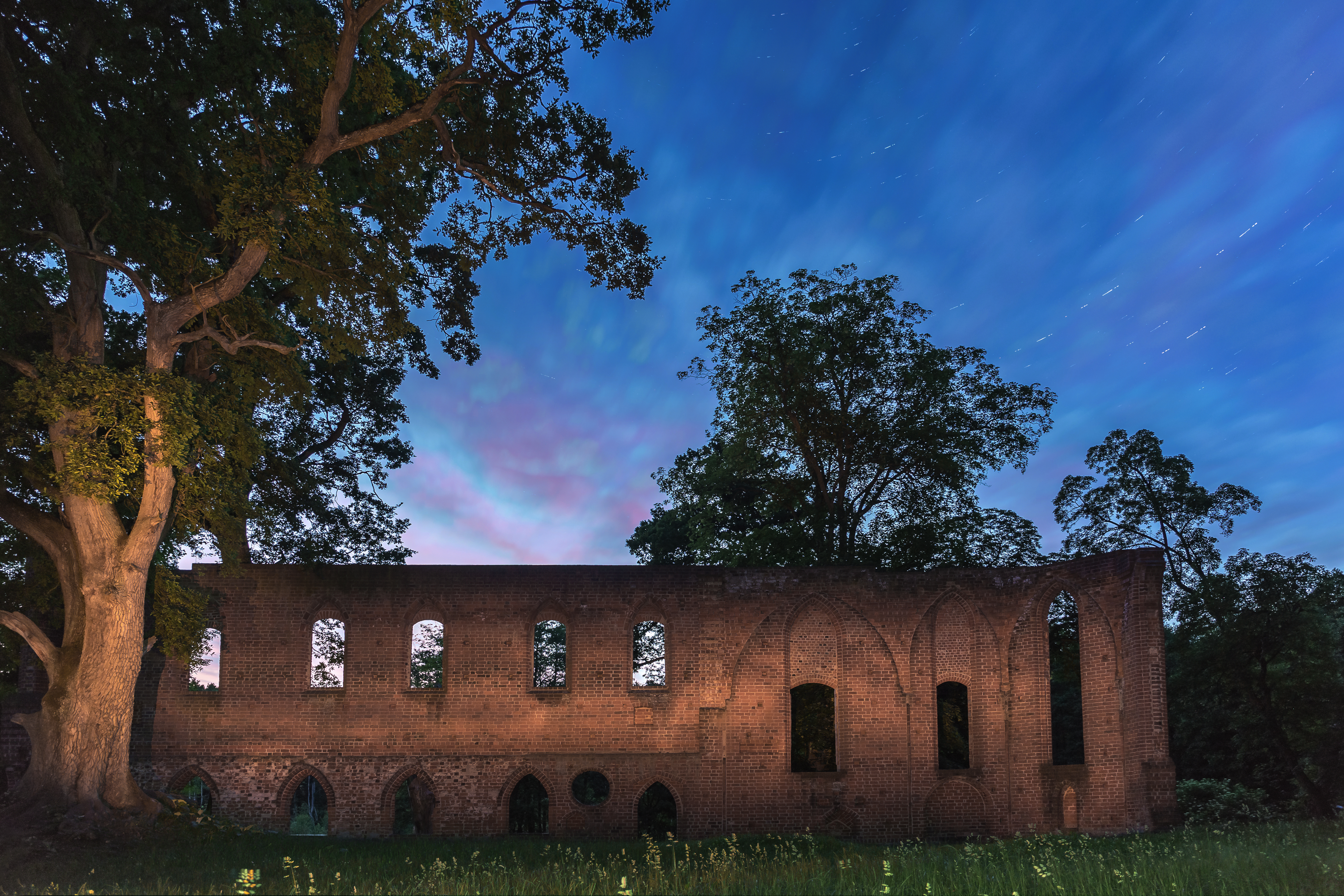 Zisterzienser-Nonnenkloster in Boitzenburg